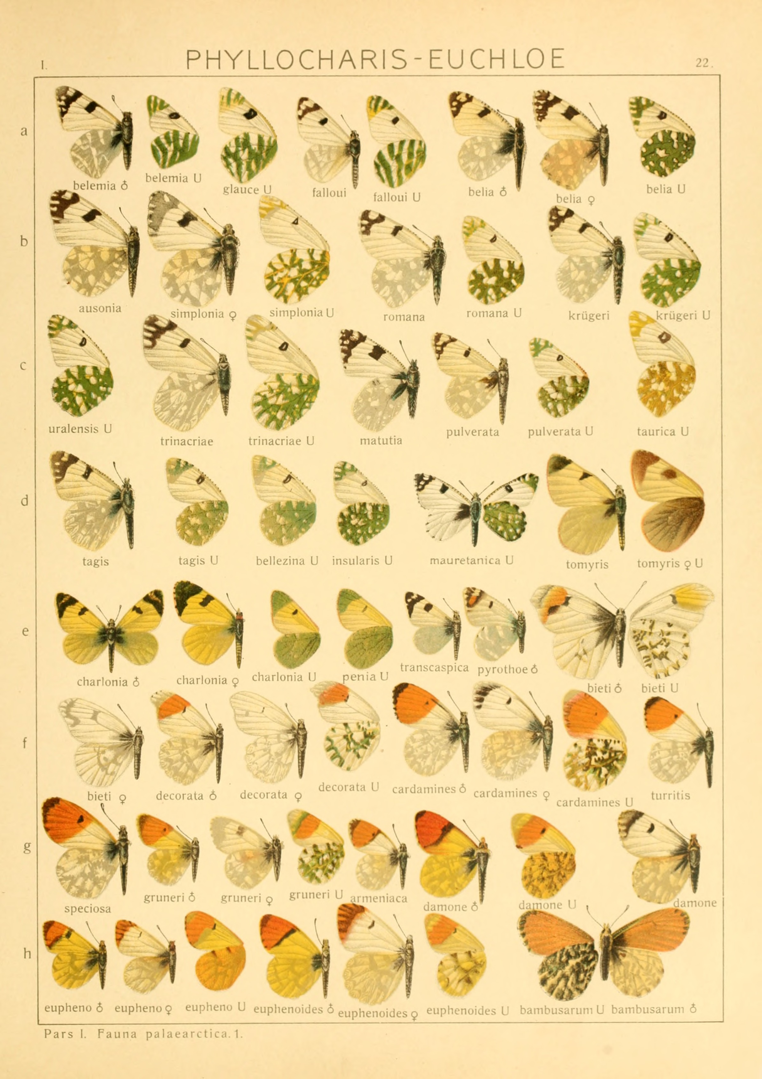 Plate from Seitz, A. Ed., 1900-1909 Die Großschmetterlinge der Erde, Verlag Alfred Kernen, Stuttgart Die Großschmetterlinge des palaearktischen Faunengebietes(The Macrolepidoptera of the world : a systematic account of all the known Macrolepidoptera) Band 1: Abt. 1, Die Großschmetterlinge des palaearktischen Faunengebietes, Die palaearktischen Tagfalter. read text (in German) See The Global Lepidoptera Names Index for valid names